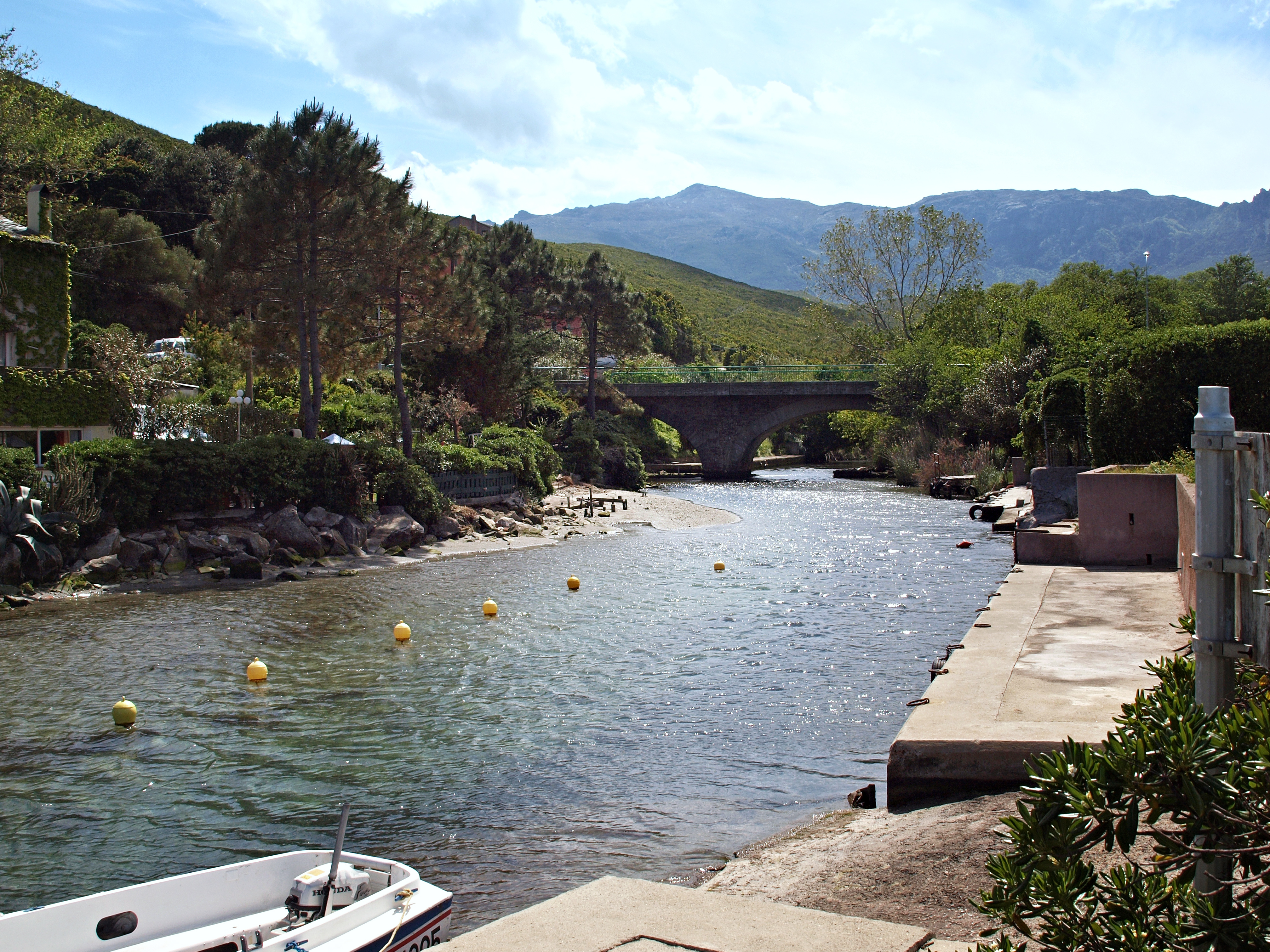 Pietracorbara, Cap Corse (Corse) - Le ruisseau de Pietracorbara (fiume di Pietracorbara) peu avant son embouchure au sud de la plage de sable